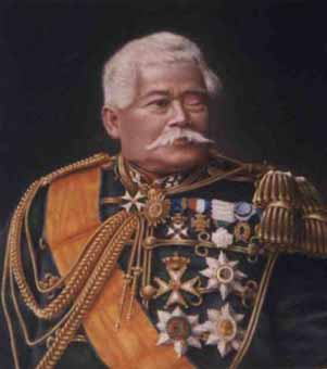 Portret van rond 1882